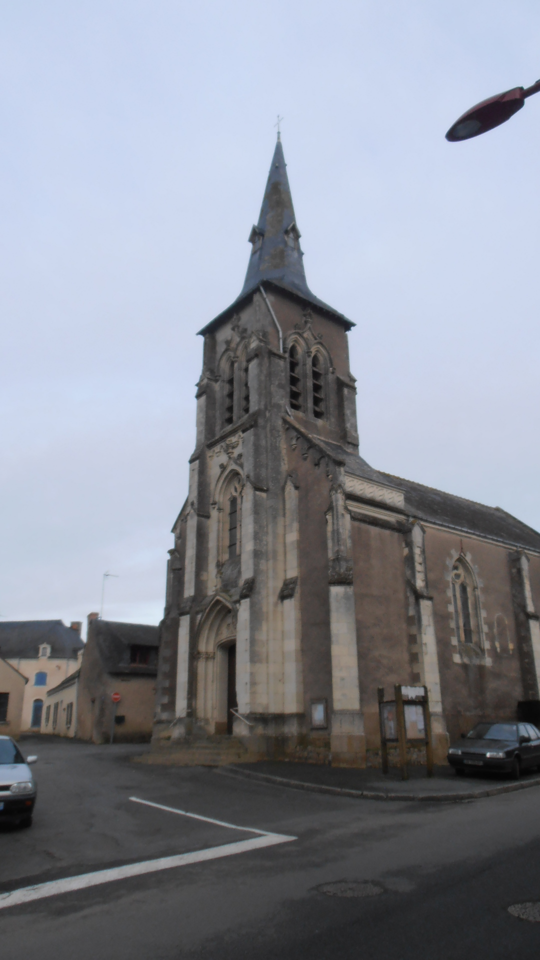 l'église de la commune de querré